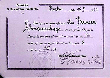 Odznaka